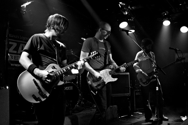 Eric Howden alias Raise by Swans